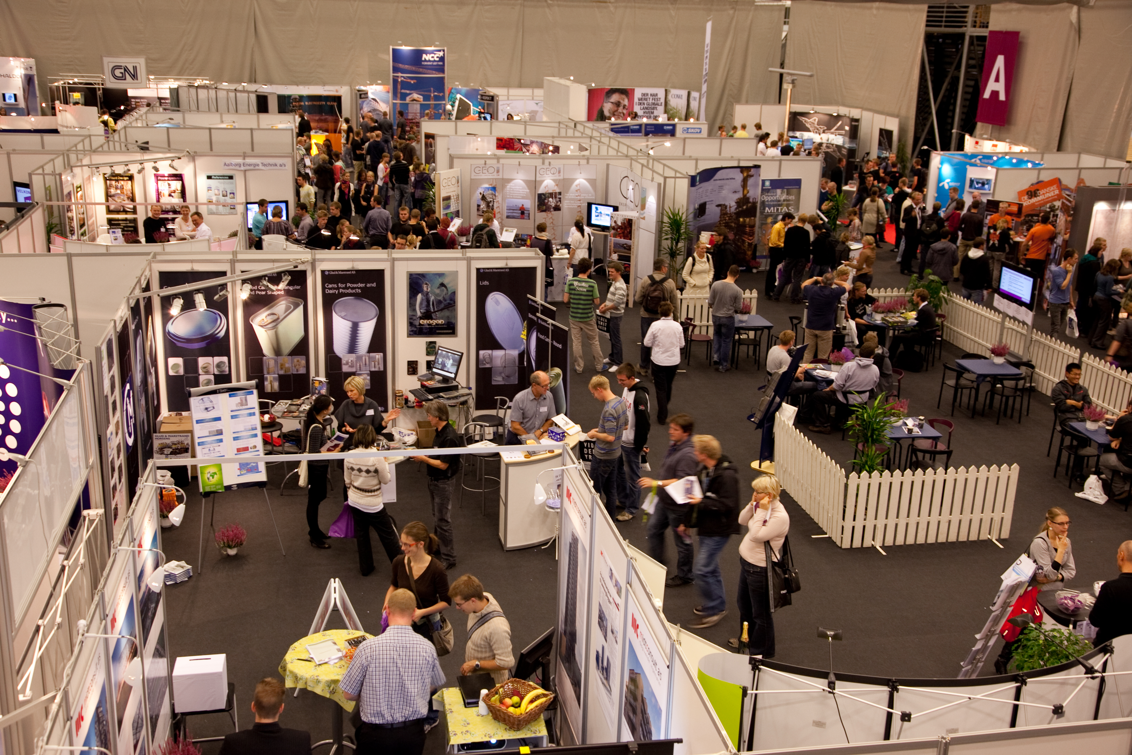 Billede tage under DSE Messe Jobtræf Aalborg i 2009.